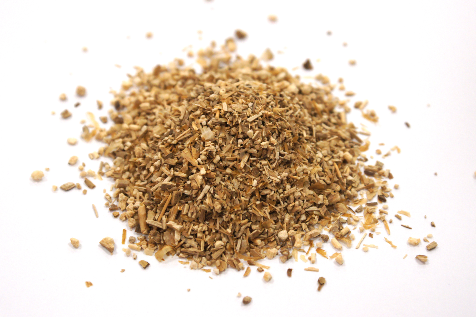 Aus Stengel und Zweigspitzen geschnittener Anguratè Magentee.